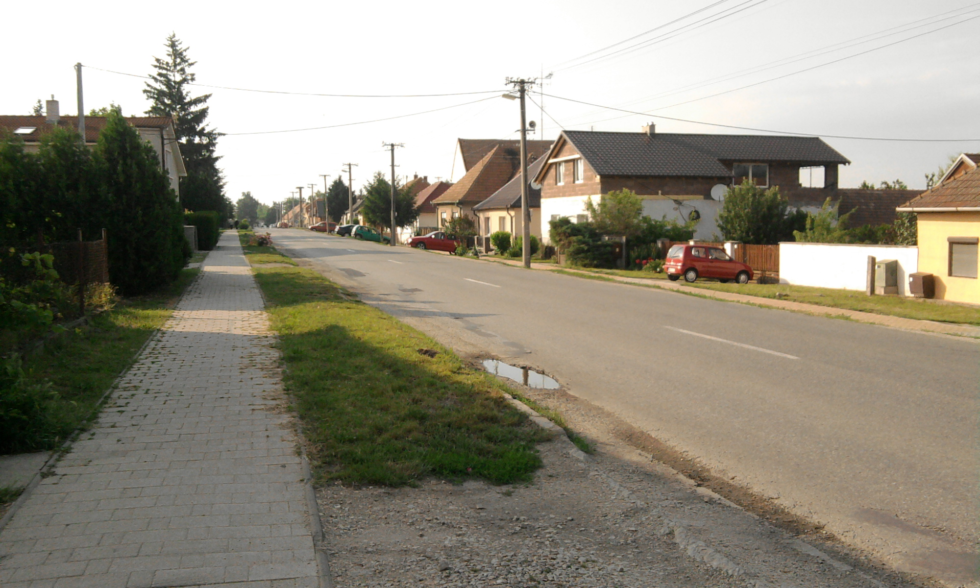 hlavná ulica v obci Zbehy